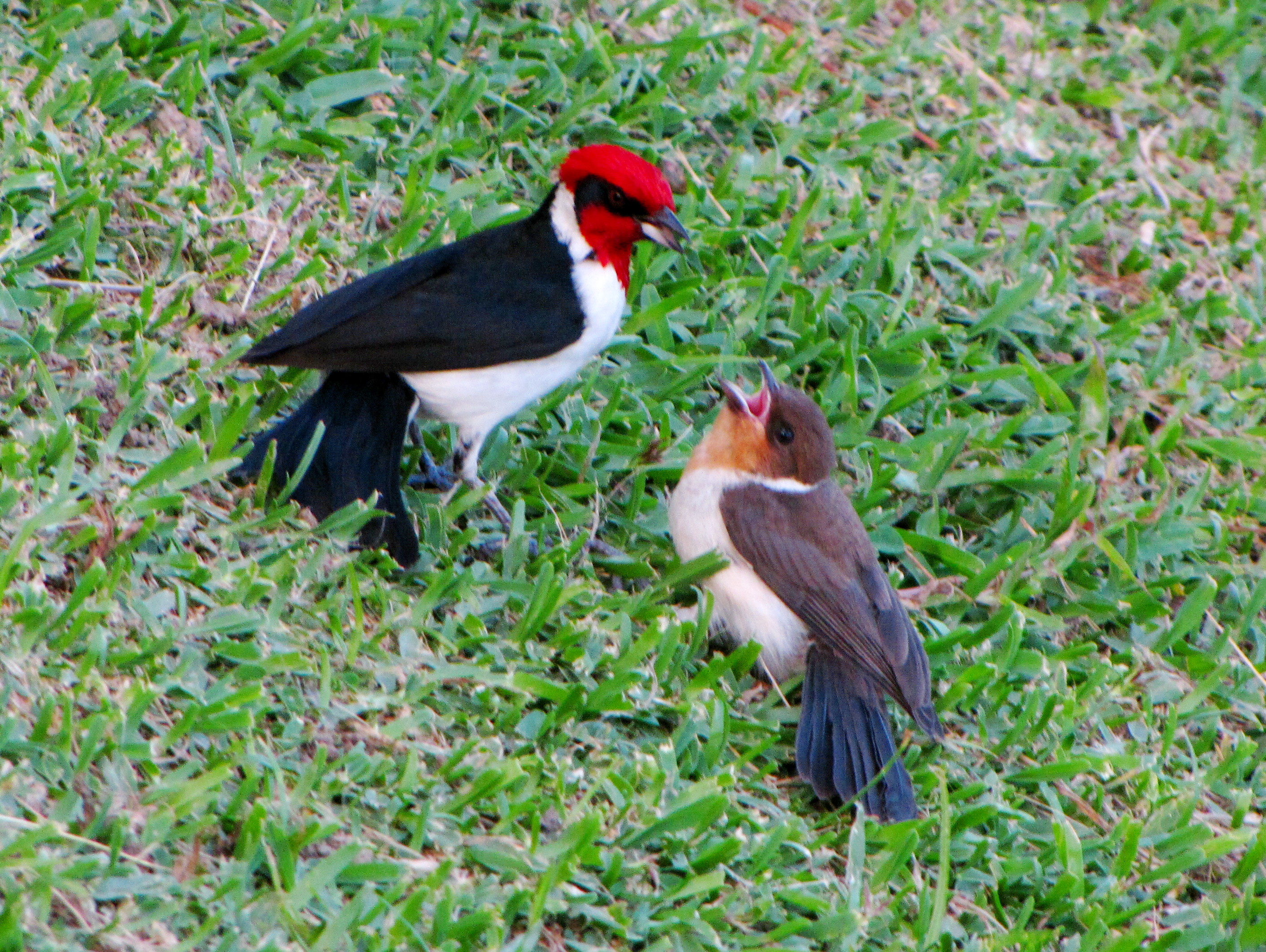 Paroaria gularis nigrogenis Lugar / place / lieu : El Laguito, Fuerte Tiuna. Caracas, Venezuela.